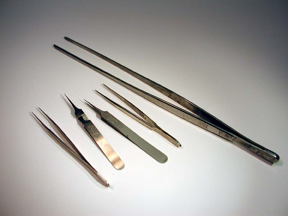 Original description: "Pinzetten gross" (tweezers large).